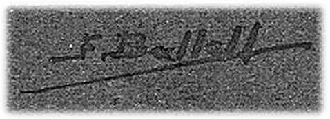 Firma autografa del fotografo ingeniero industrial Federico Ballell Maymi, Urgell 68/3 Barcelona, apposto sul cartoncino di supporto della fotografia scattata il 12 aprile 1913 nello studio della "American Clinica" di Juan Garcia-Bravo in Ronda S. Antonio, 102 e pubblicata su "Mundo Grafico" del 30 aprile dello stesso anno.